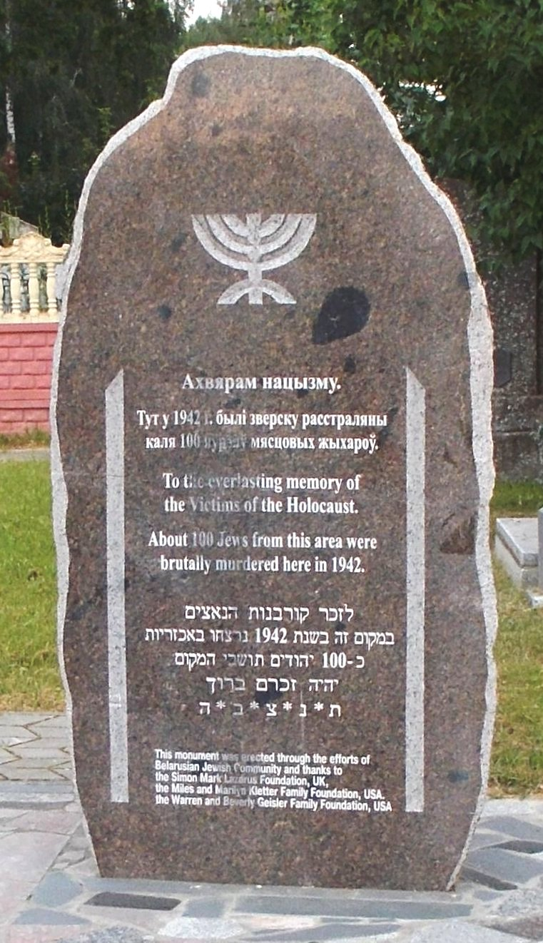 Памятник около 100 убитым нацистами и их прислужниками на этом месте в 1942 году евреям - узникам гетто в Жабинке (Брестская область). Находится в Жабинке у кладбища недалеко от дома № 1 по улице Мира.